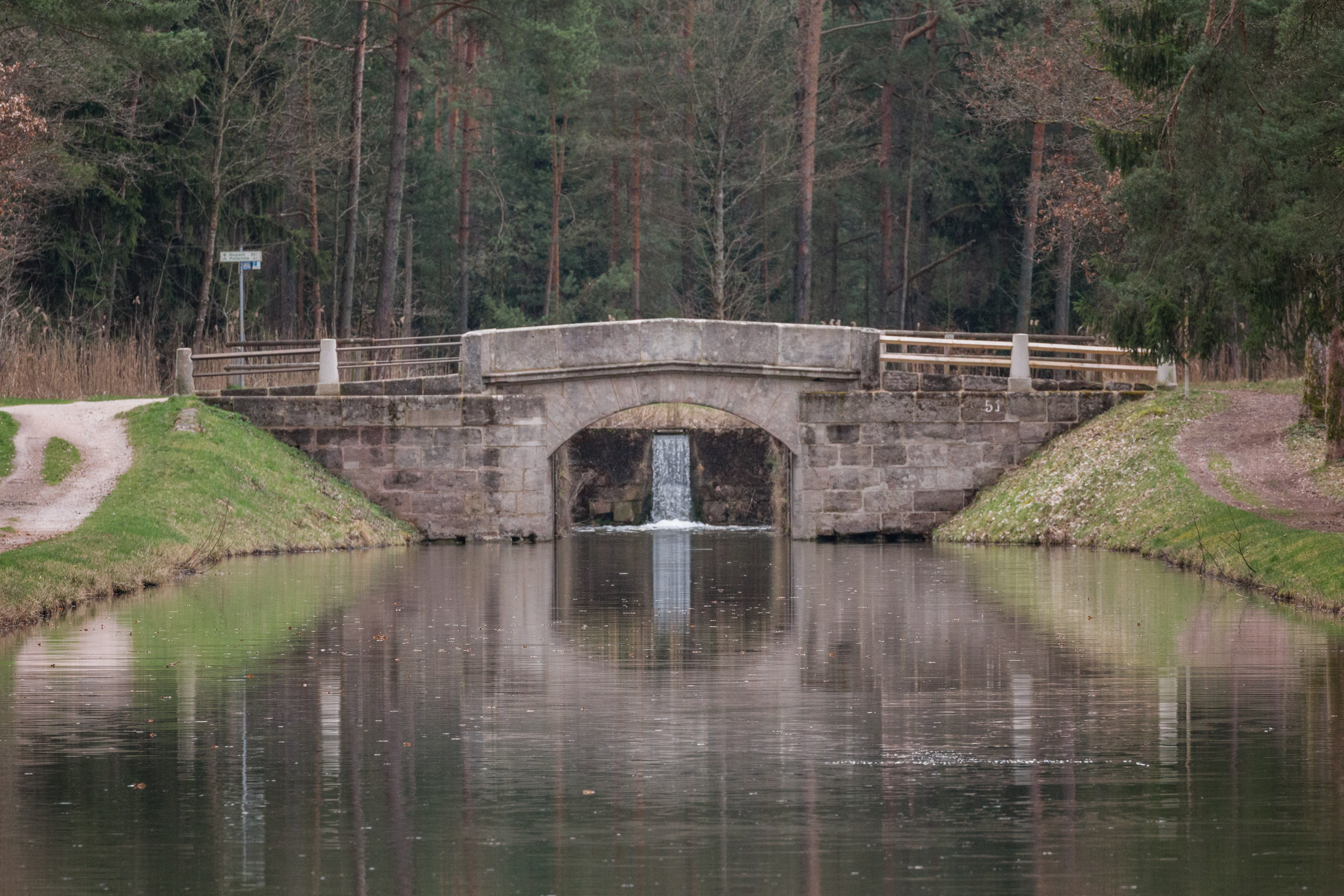 Ludwig-Donau-Main-Kanal, Schleuse 51This is a photograph of an architectural monument.